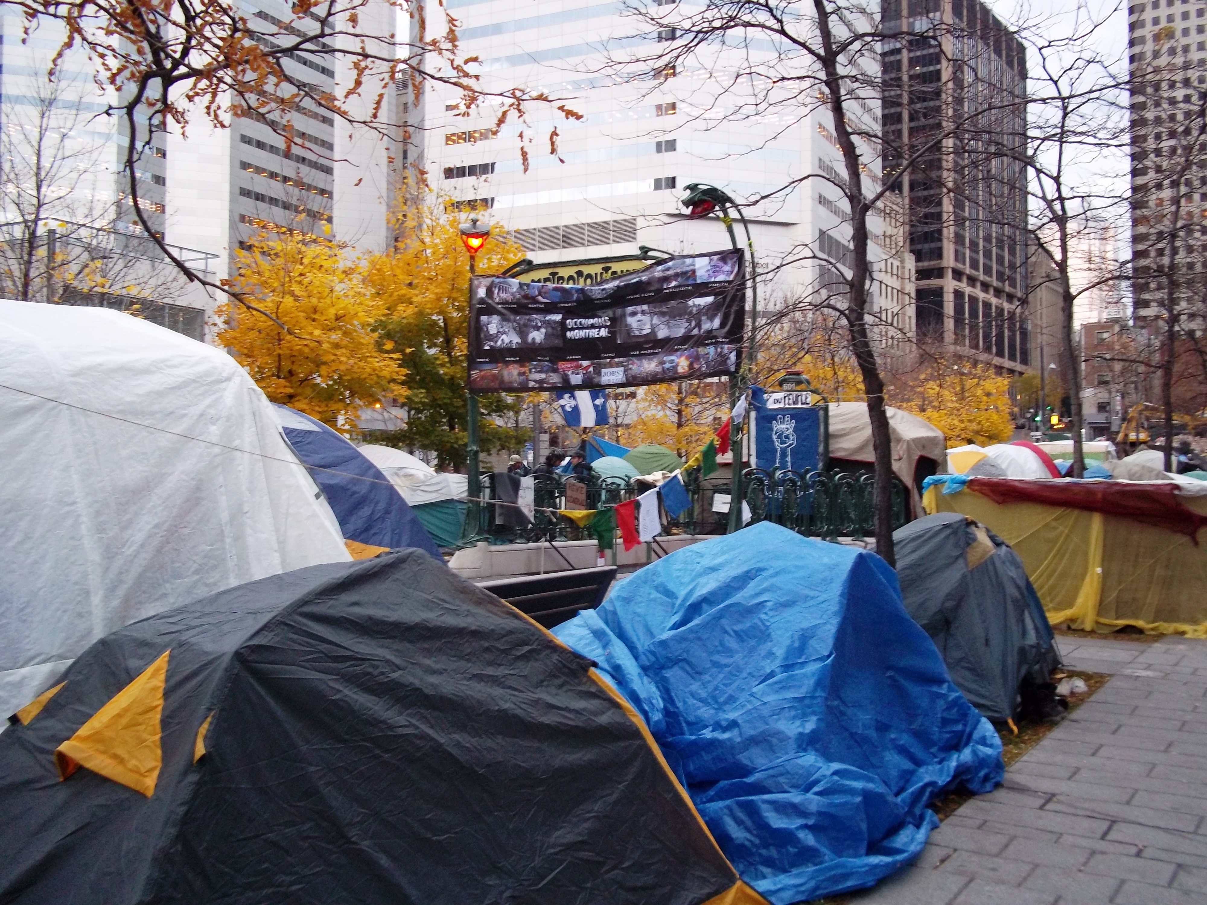 Photo d'Occupons Montréal, inspiré de Occupy Wall Street. Les manifestants occupent le Square Victoria.